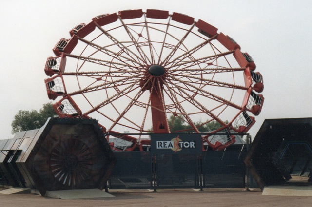 Ancienne attraction reaktor de BBS